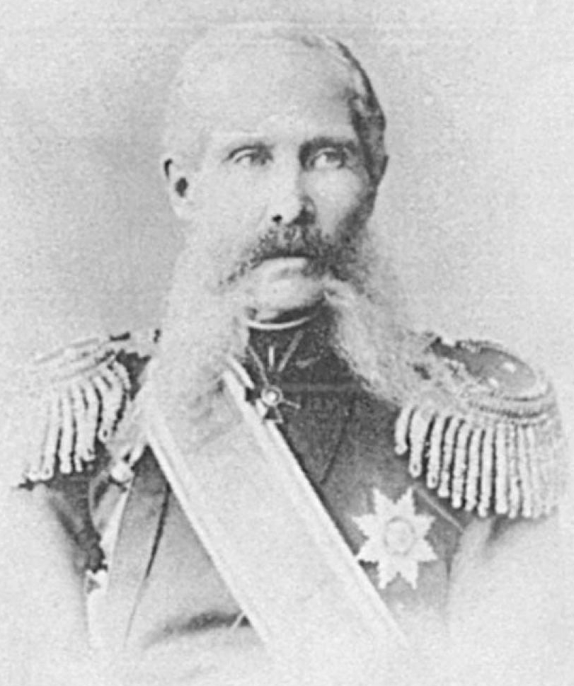 генерал Гинце Андрей Иванович